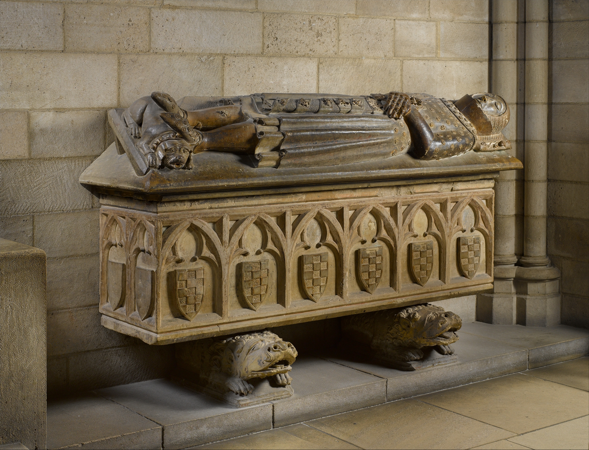 Catalan; Tomb; Sculpture